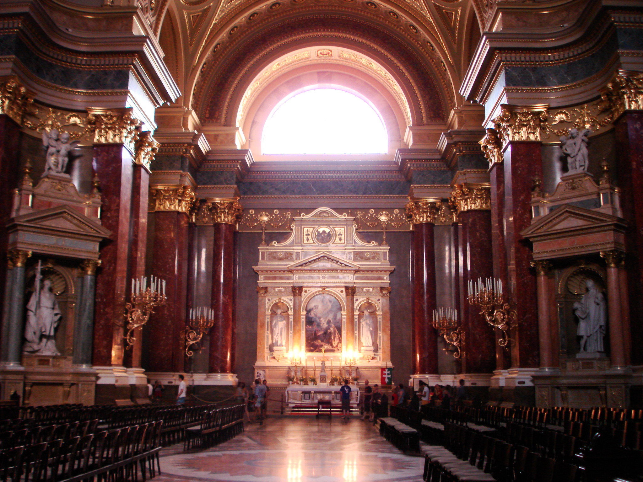 Questa foto rappresenta l'interno della basilica di Santo Stefano a Budapest, è stata scattata da me, G. Salluzzi ad agosto 2007 ed è rilasciata in Pubblico Dominio